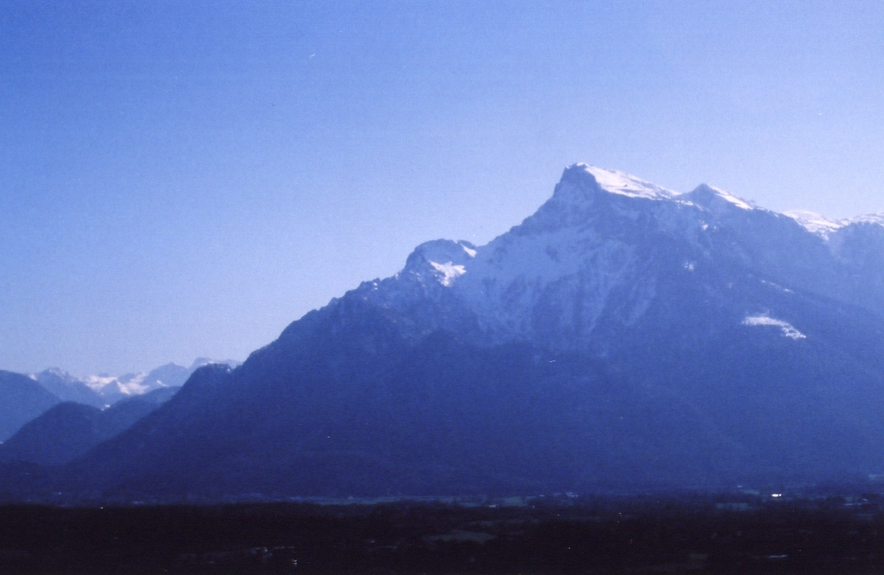 Untersberg, Alps, Germany-Austria